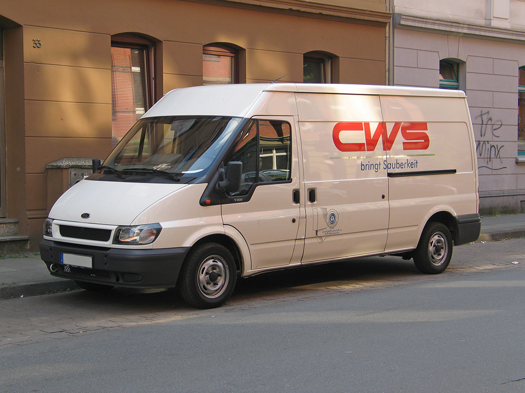 Ford Transit L3H2